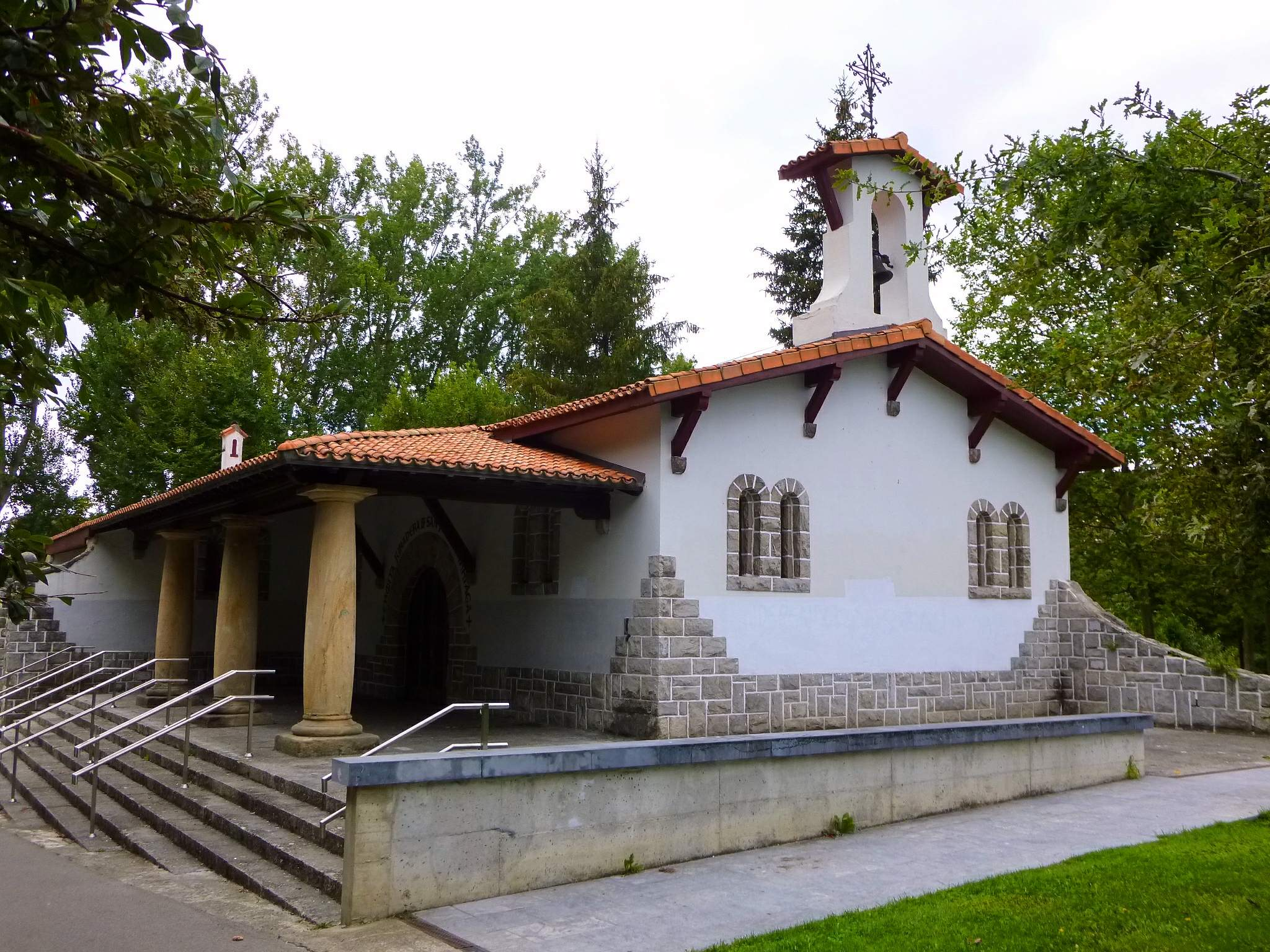 Ermita juradera de San Juan de Arriaga (Vitoria-Gasteiz)